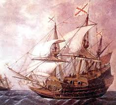 Galeón español